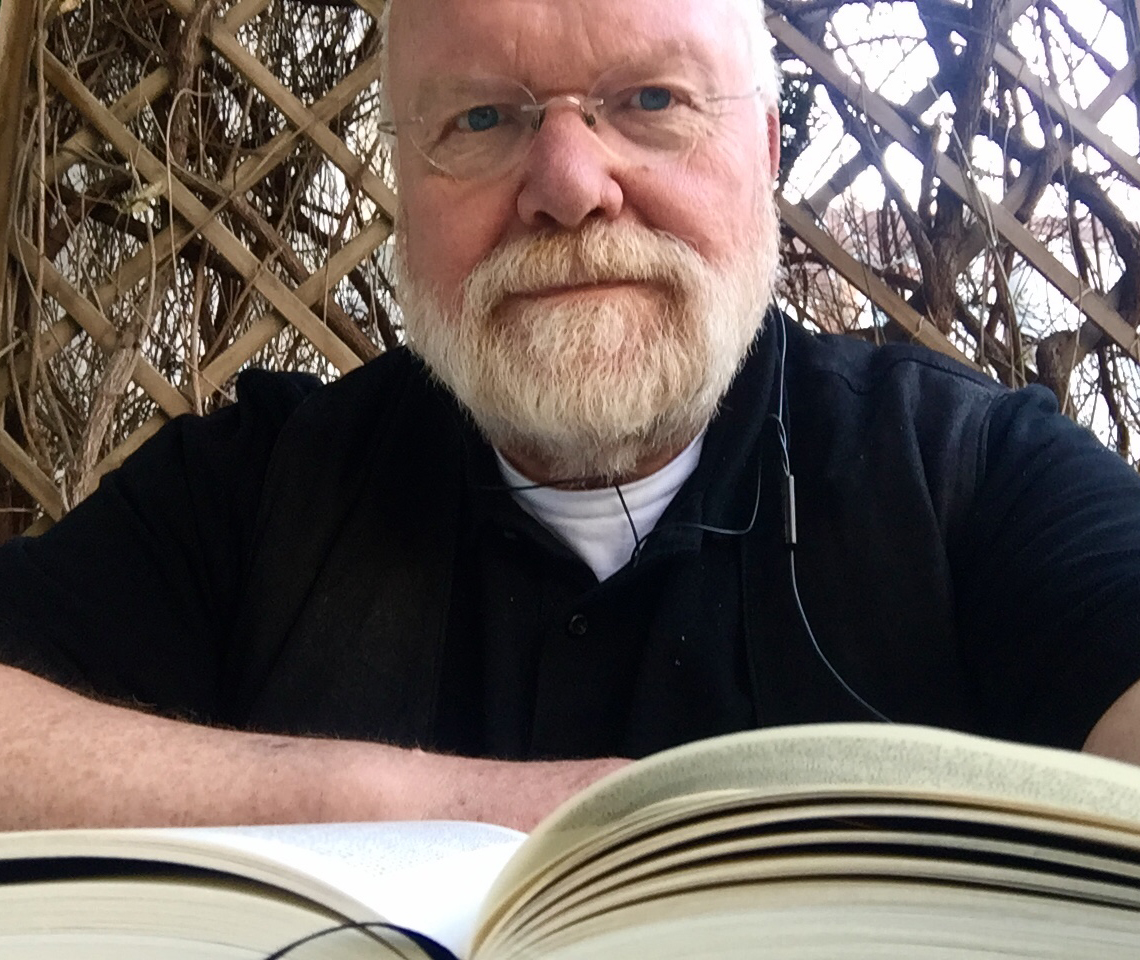 Selbstporträt von Reinhold Fahlbusch am 8. April 2018